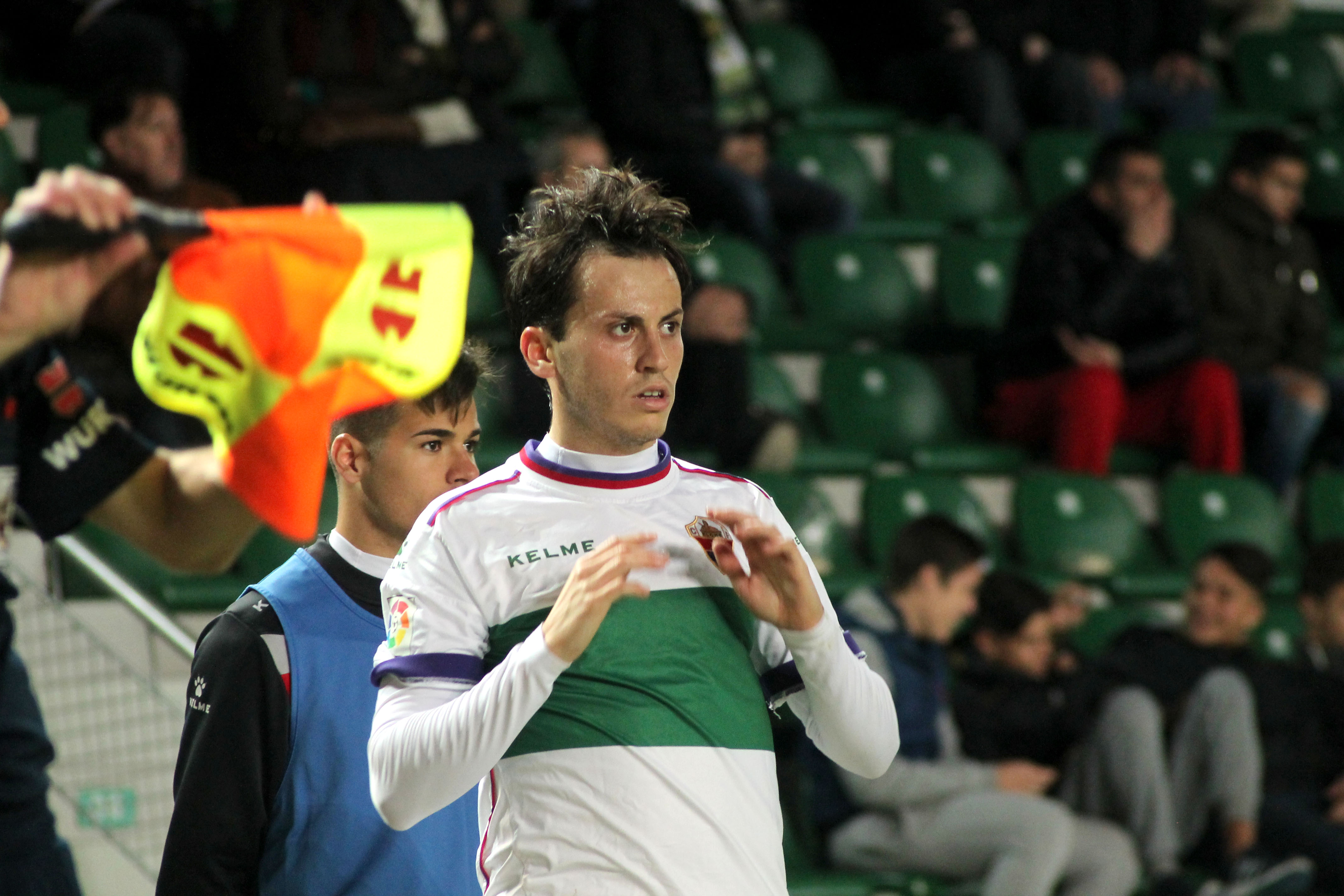 Elche vs Mallorca